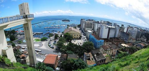 Brasil, Salvador, Elevador Lacerda. Blick von der Oberstadt auf die Hafenanlage, links ist der Fahrstuhl Elevador Lacerda zu sehen, welcher die Ober- mit der Unterstadt verbindet.